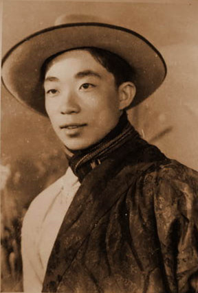 1955年时，18岁的程宽德